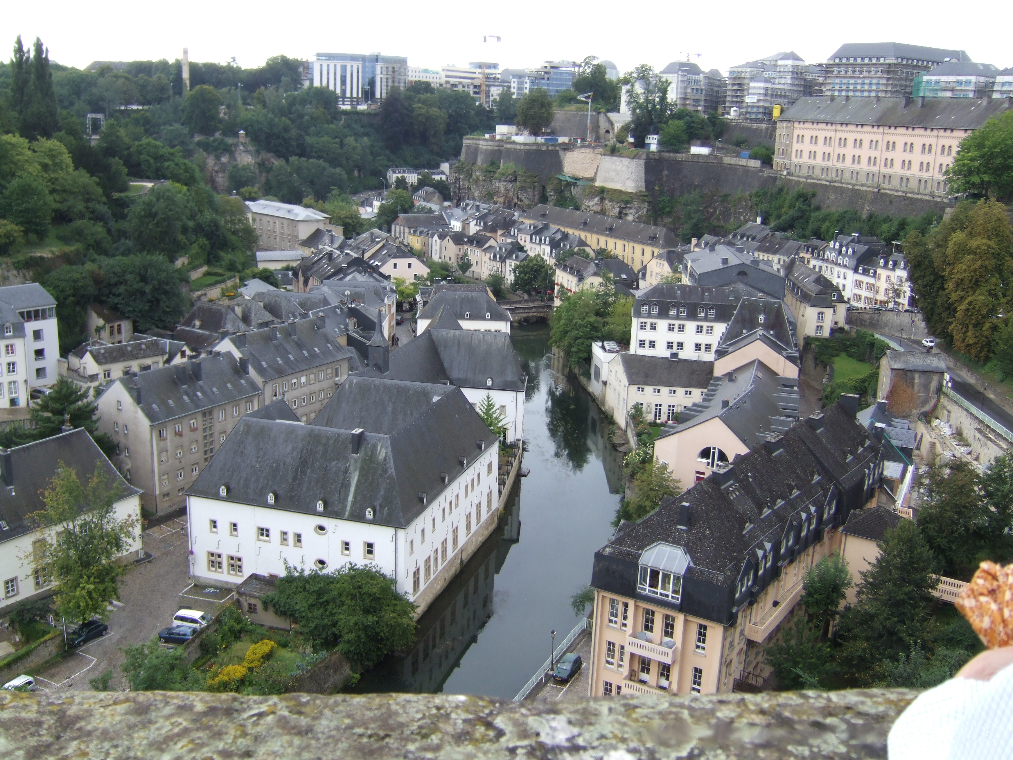 Città di Lussemburgo: la città bassa